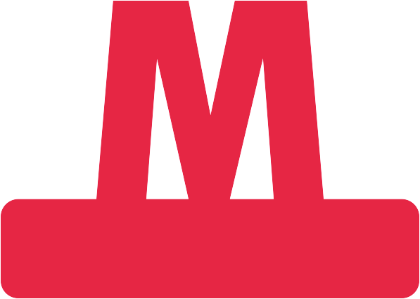 Logo du métro de Copenhague